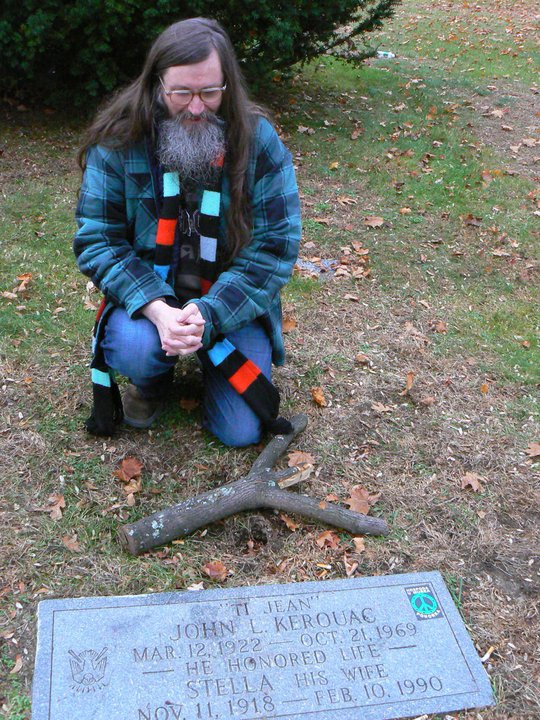 Milan Kozelka, spisovatel, performer